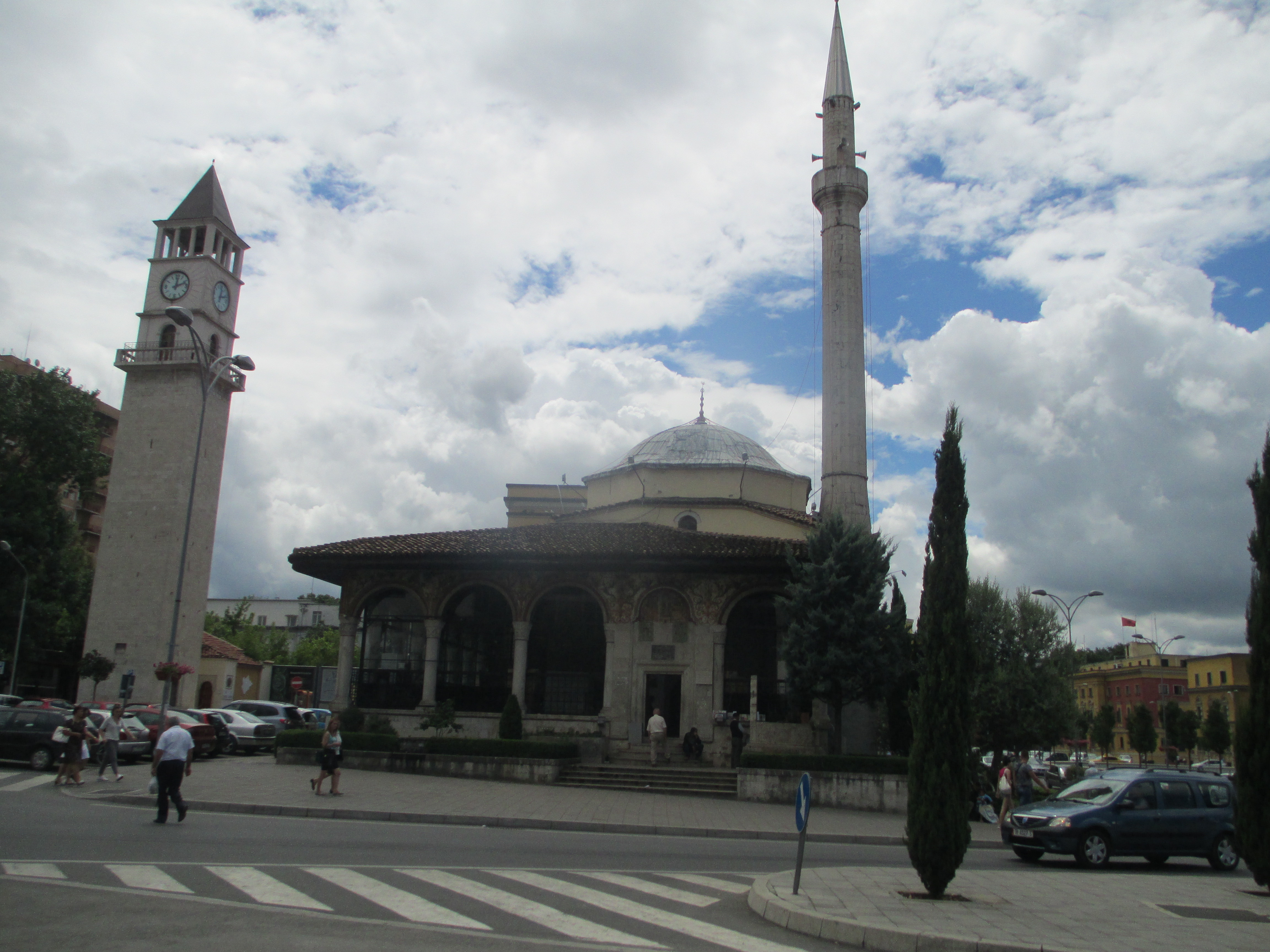 מסגד אטהם ביי ומגדל השעון בטירנה